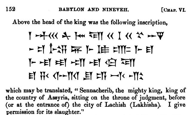 Assyrische Keilschrift über dem Kopf des Königs